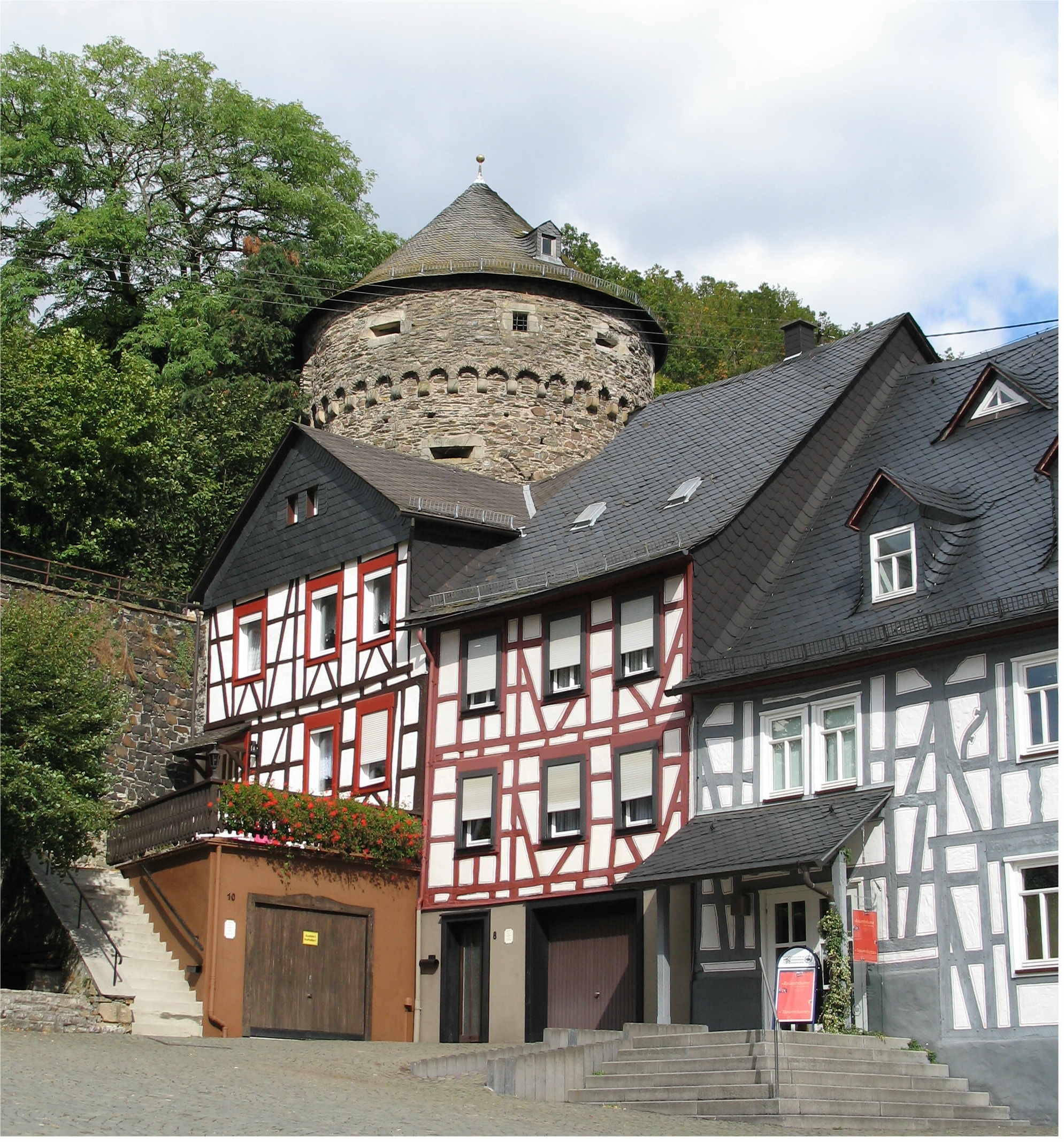 De Schinderhannesturm zu Herrstein am Naheland. Häuser von rechts: Schloßweg 6, 8, 10